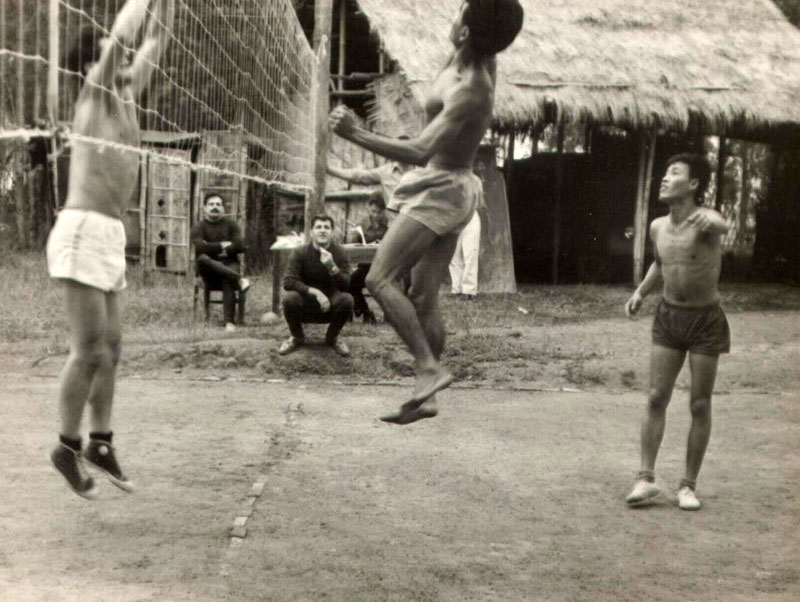 Советские военные и вьетнамские товарищи играют в волейбол. Вьетнамцы очень любили волейбол. Фотоальбом Владимира Михайловича Лагутина.